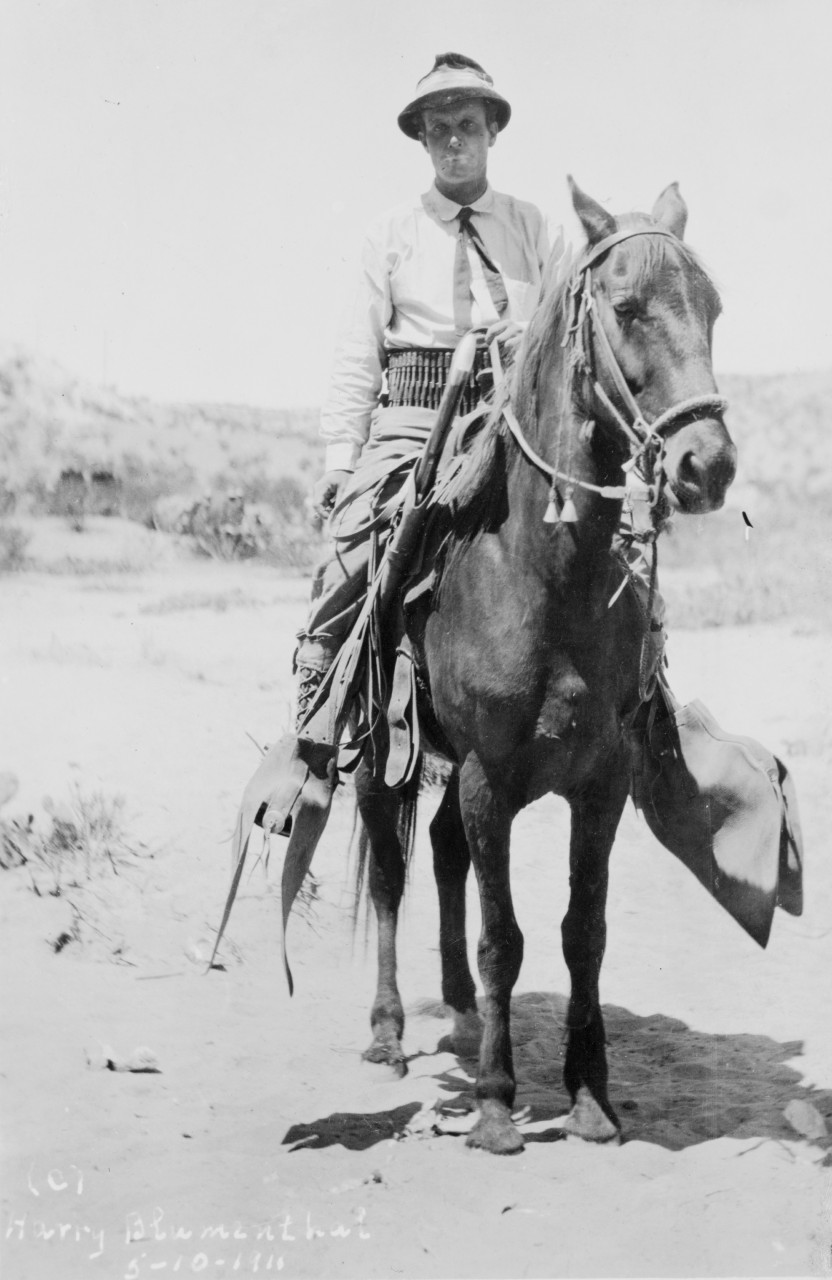 General Peppino Garibaldi durante la Revolución Mexicana